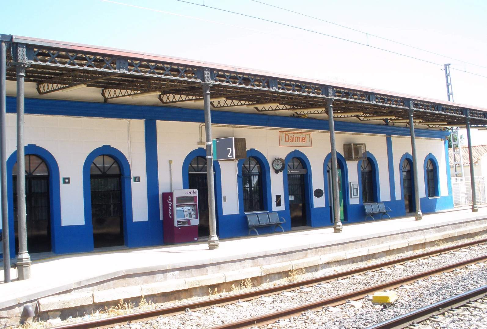 Estación de Adif de Daimiel (Ciudad Real)